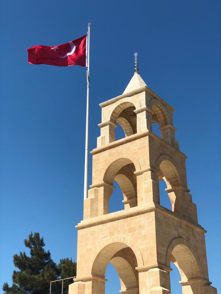 هذا النصب التذكاري لشهداء معركة جناق قلعة التي حدثت عام 1915 في تركيا